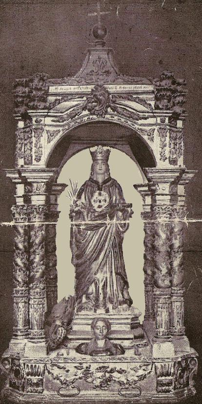 Foto d'epoca di Santa Margherita V.M patrona di Licodia Eubea , collezione di Gregorio Giarrusso.